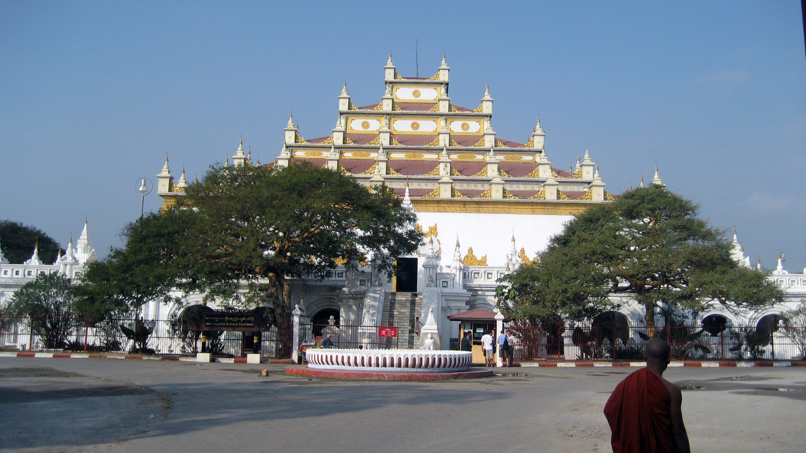 Atumashi Monastery, Mandalay, Myanmar